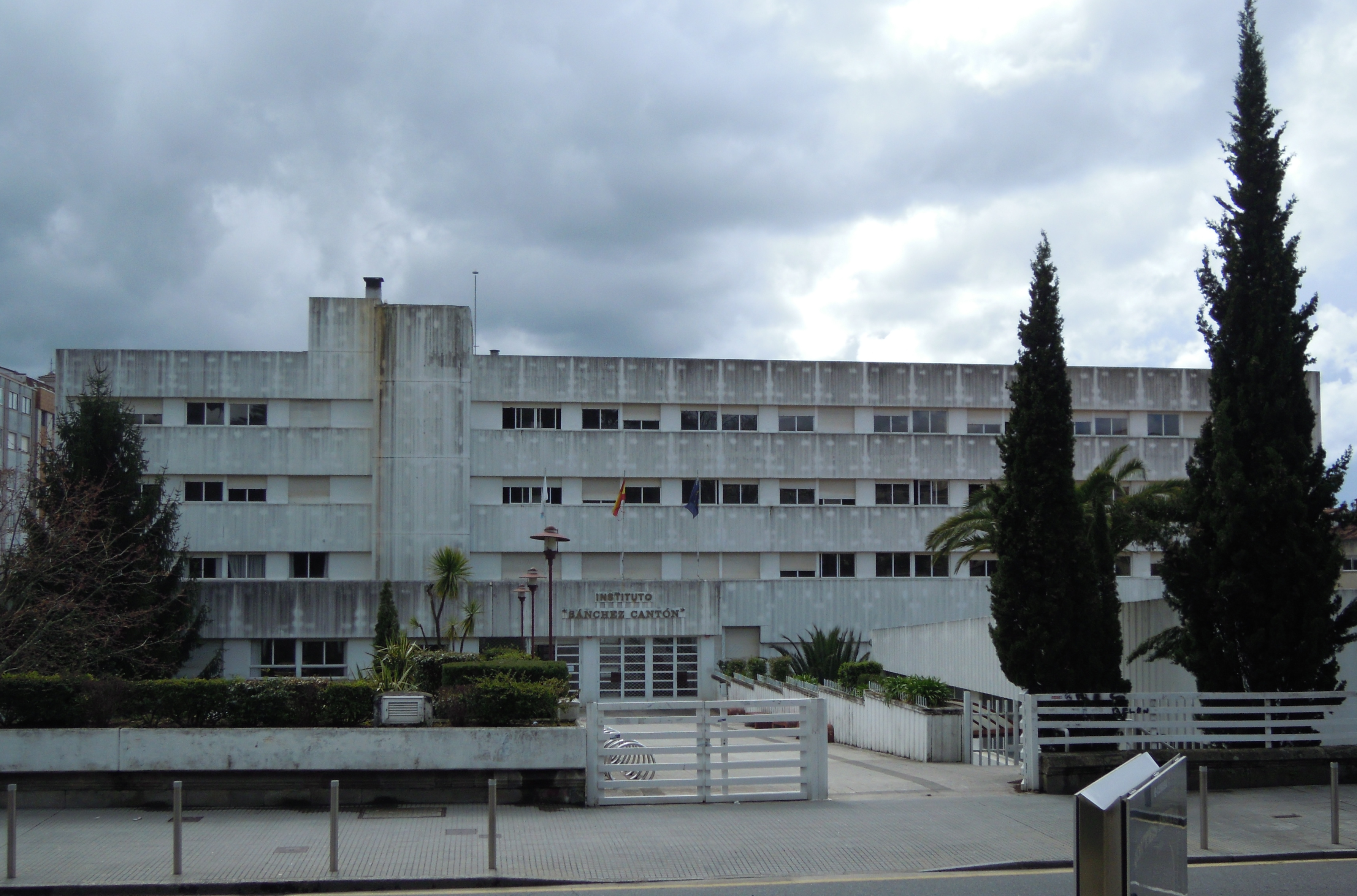 Instituto Sánchez Cantón de Pontevedra